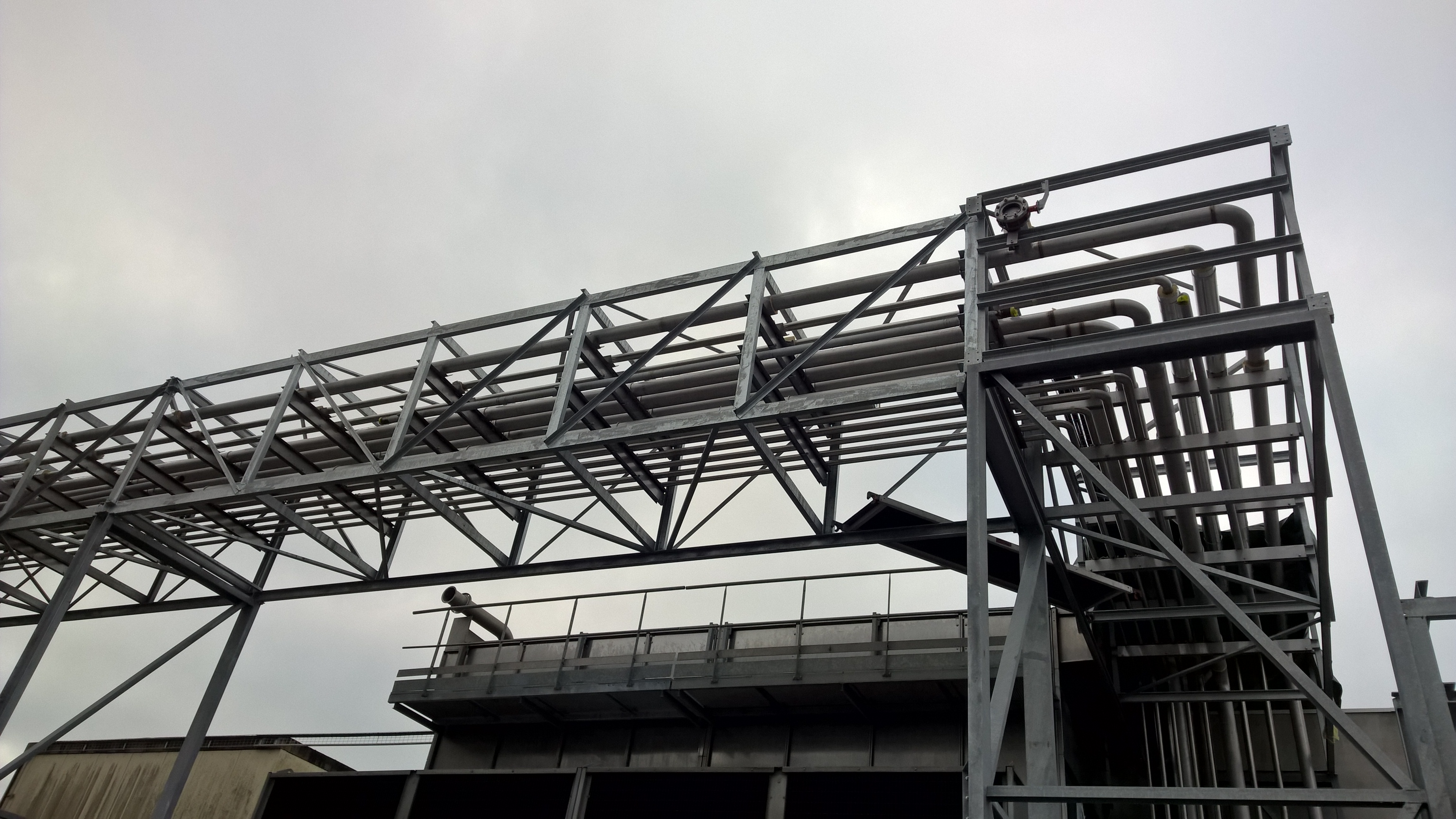 Support aérien de tuyauterie dans une laiterie